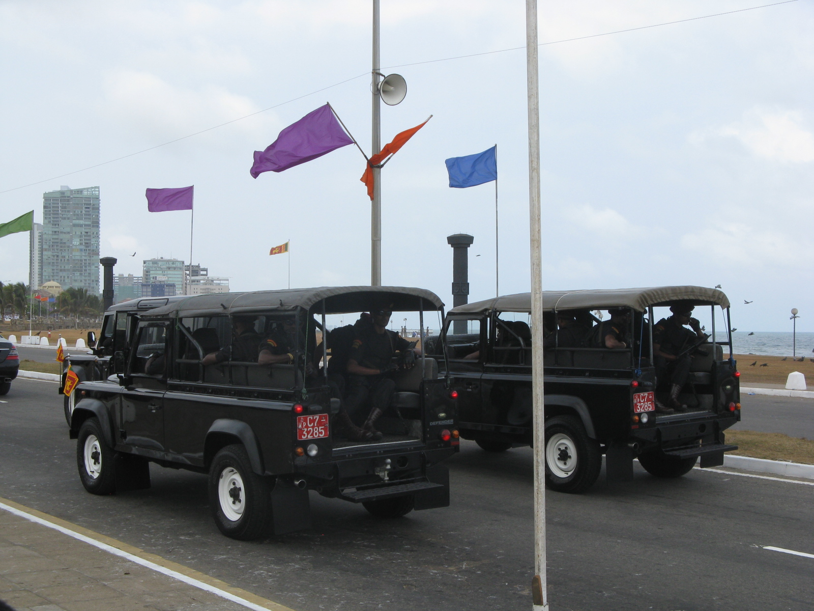 President's Guard VIP Escort Jeeps - Sri Lanka Army